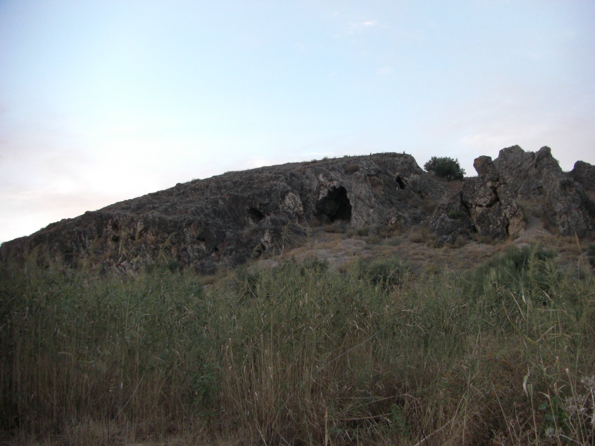 Vista del olistolito situado a un kilómetro de Villar de Cuevas